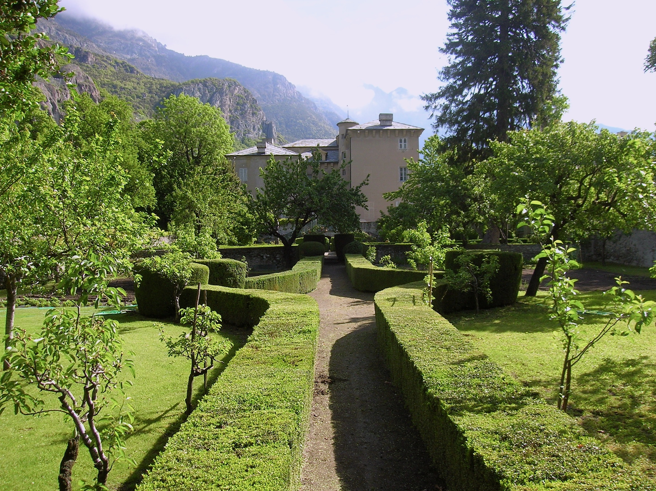 parco del Castello Passerin d'Entrèves, Châtillon, Valle d'Aosta, Italia.